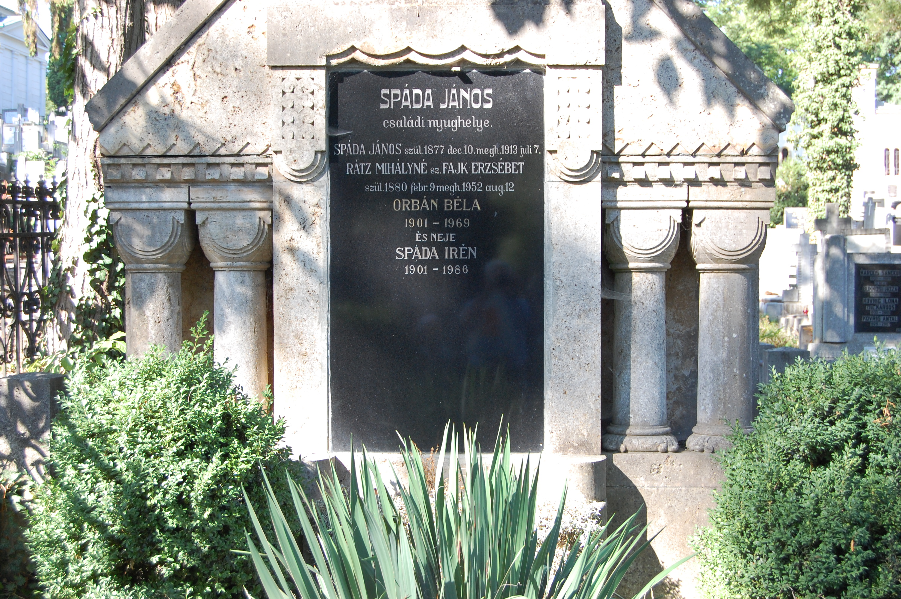 Spáda János (1977-1913) építész síremléke 193